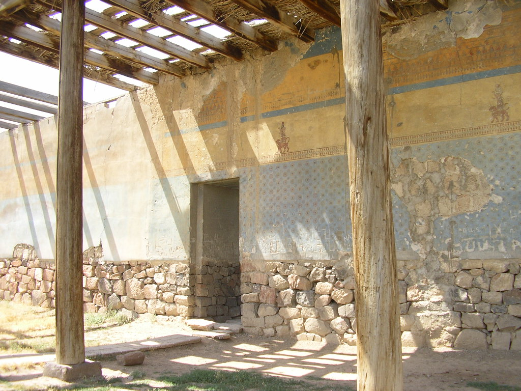 Erevan, la forteresse d'Erébouni